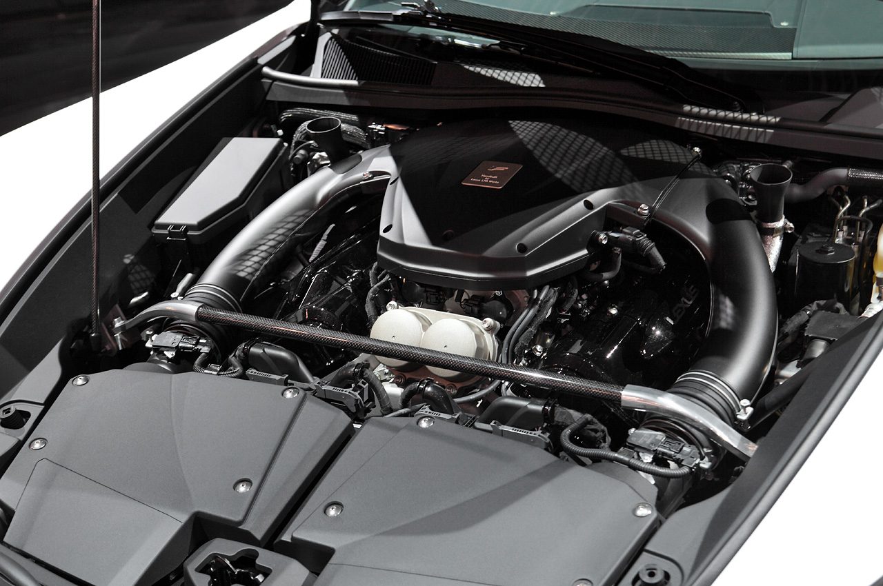 Lxus LFA.